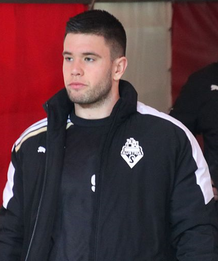 Uros Palibrk